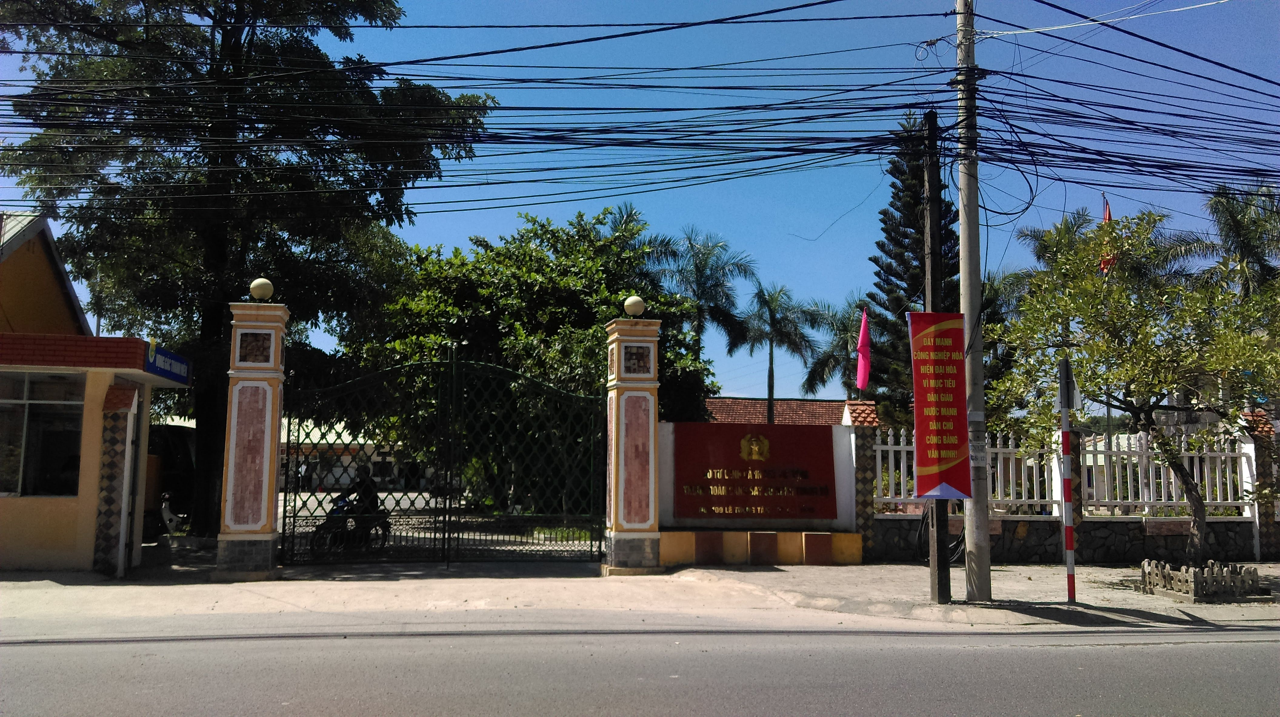 Bộ Tư lệnh Trung đoàn Cảnh sát Cơ động Trung bộ (E28), Lê Trọng Tấn, Hòa Phát, Cẩm Lệ, Đà Nẵng